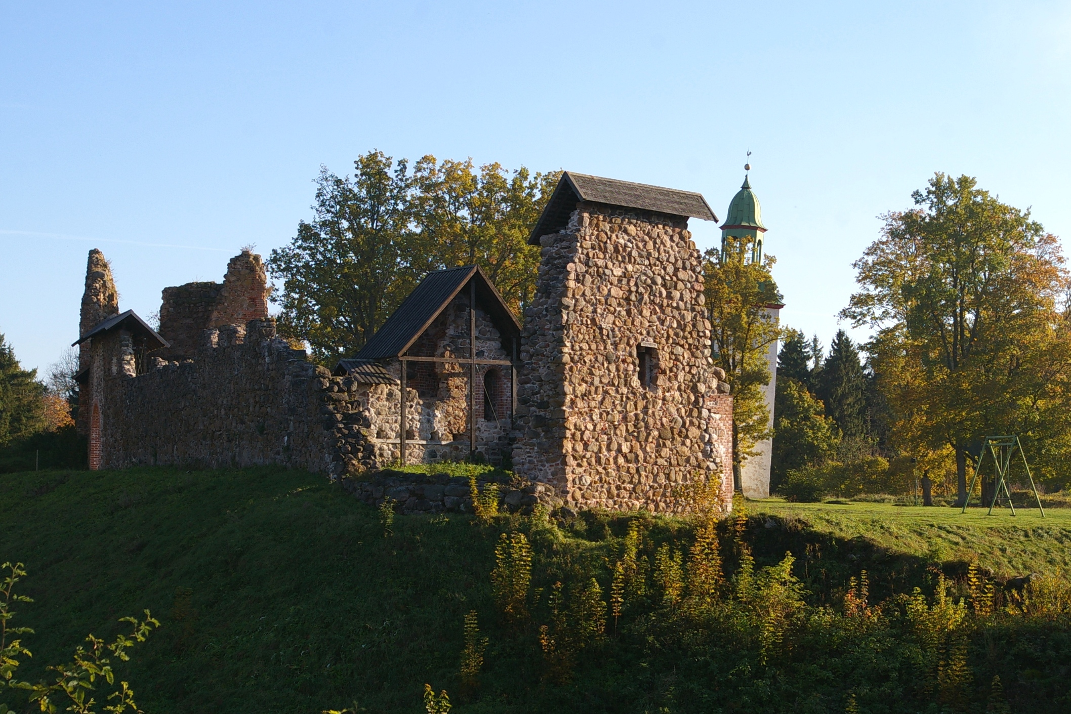 Karksi ordulinnuse varemed vallikraaviga, 13.-16.saj. Asukoht: Viljandi maakond, Karksi vald, Karksi-Nuia linn Kiriku I